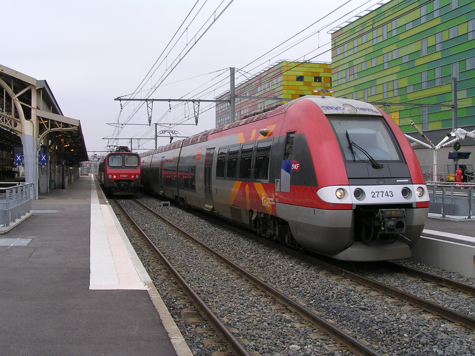 Le Z 17367 et le Z 27743 a la gare de Perpignan